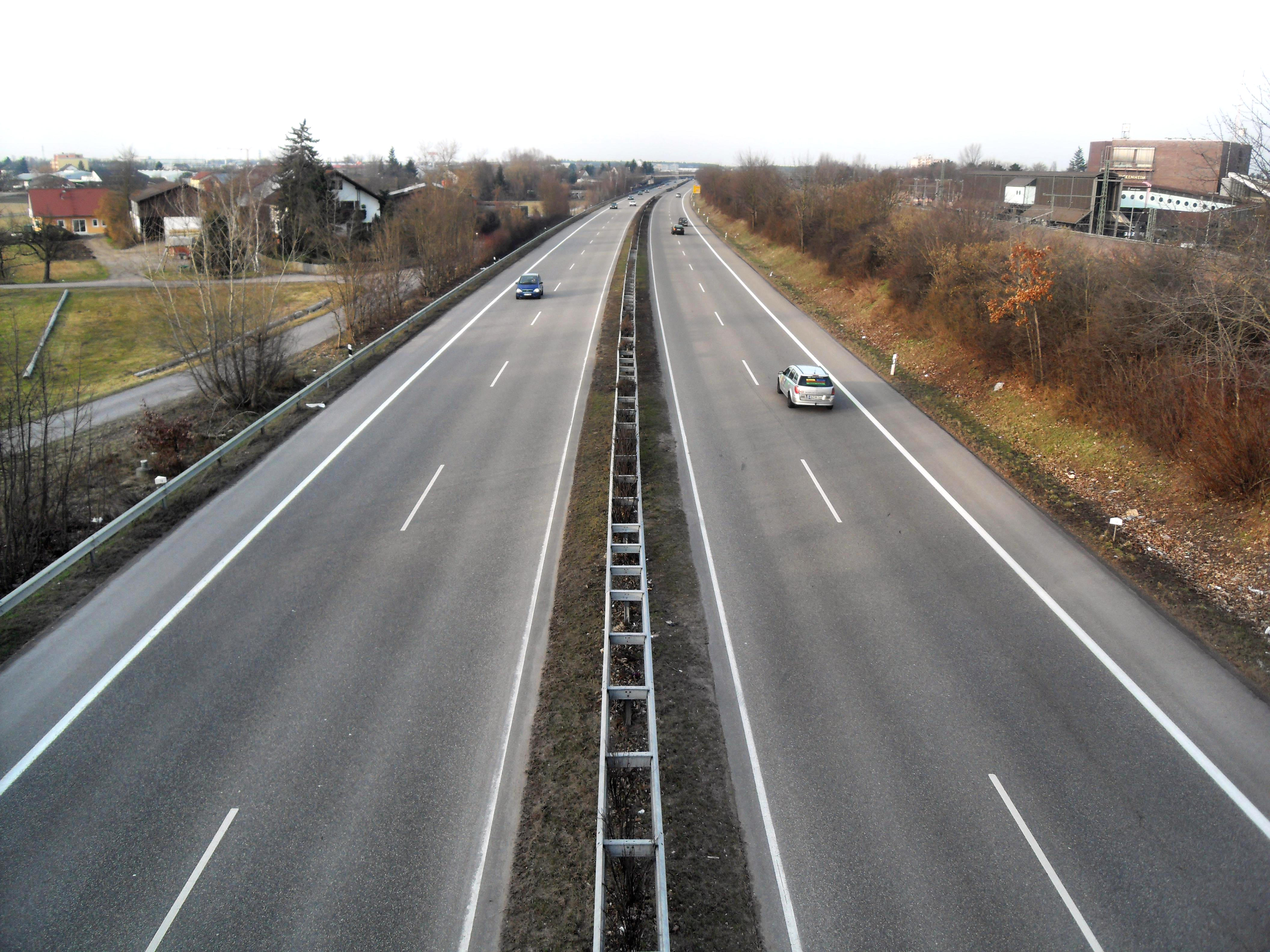 Bundesstraße 36 in Baden-Württemberg bei Hockenheim. 2016 wurde dieser Straßenabschnitt zwischen der Anschlussstelle Schwetzingen/Hockenheim und Neulußheim zur Bundesstraße 39.